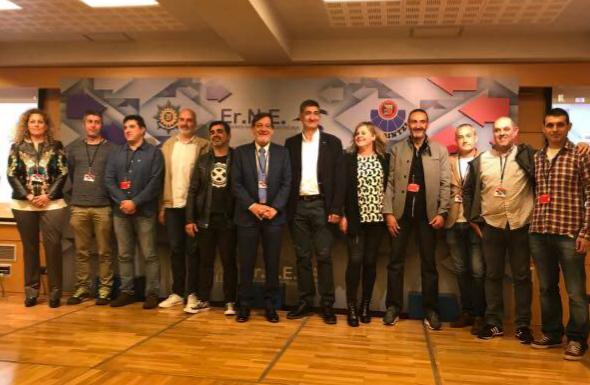 Junta rectora del X congreso